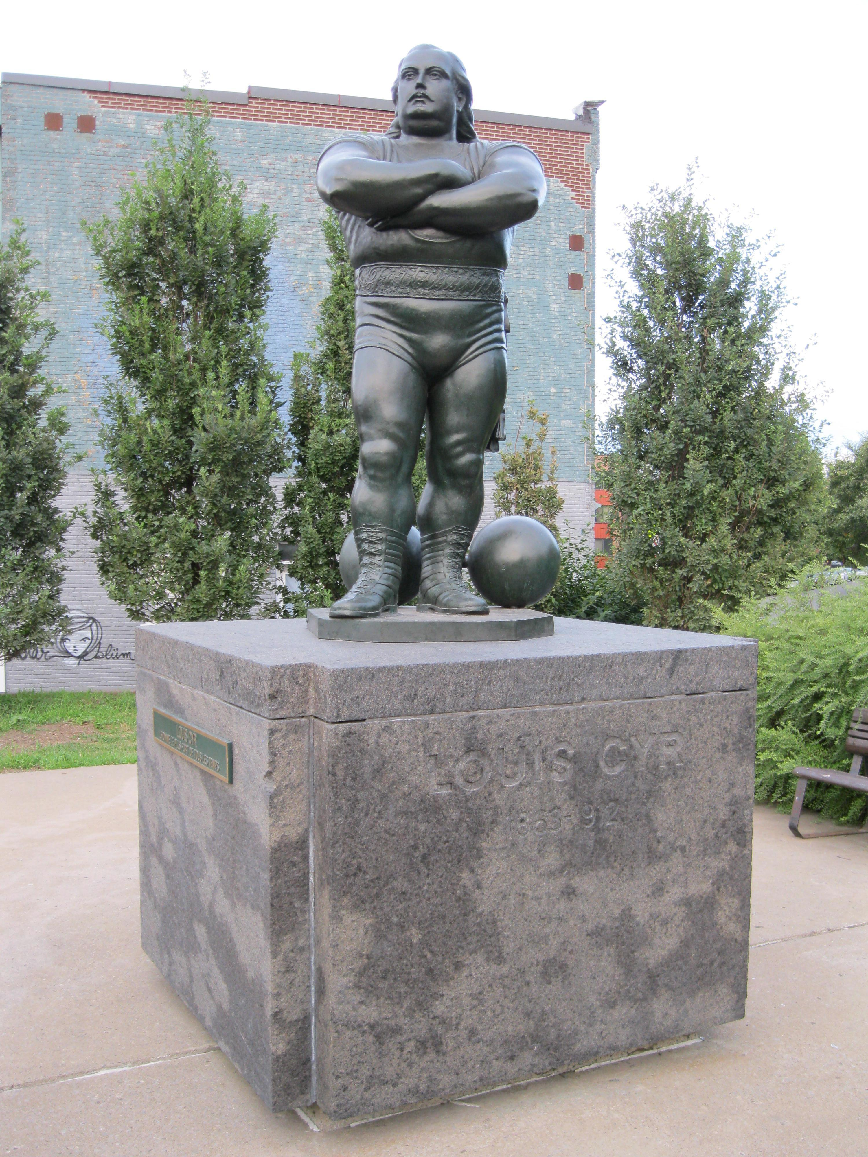 Le monument à Louis Cyr est une sculpture de Robert Pelletier (1914-1984) situé dans le quartier Saint-Henri à Montréal. Il fut inauguré en juin 1973 dans le square Élizabeth, renommé parc des Hommes-Forts en 1994.